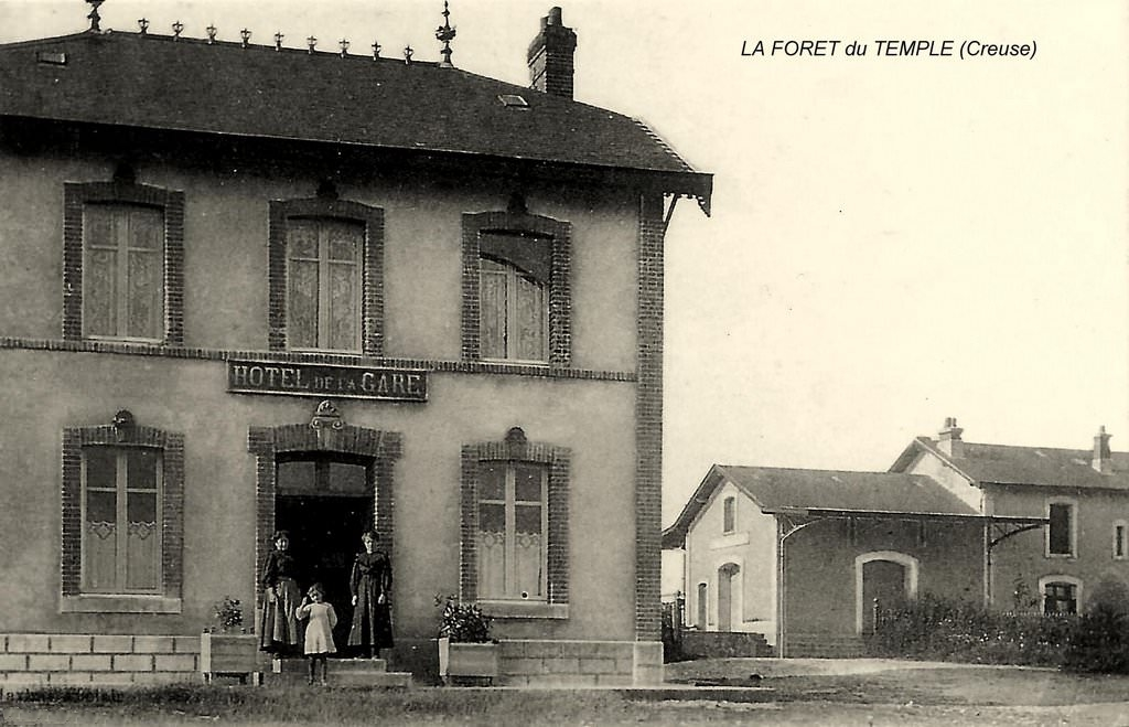 La gare